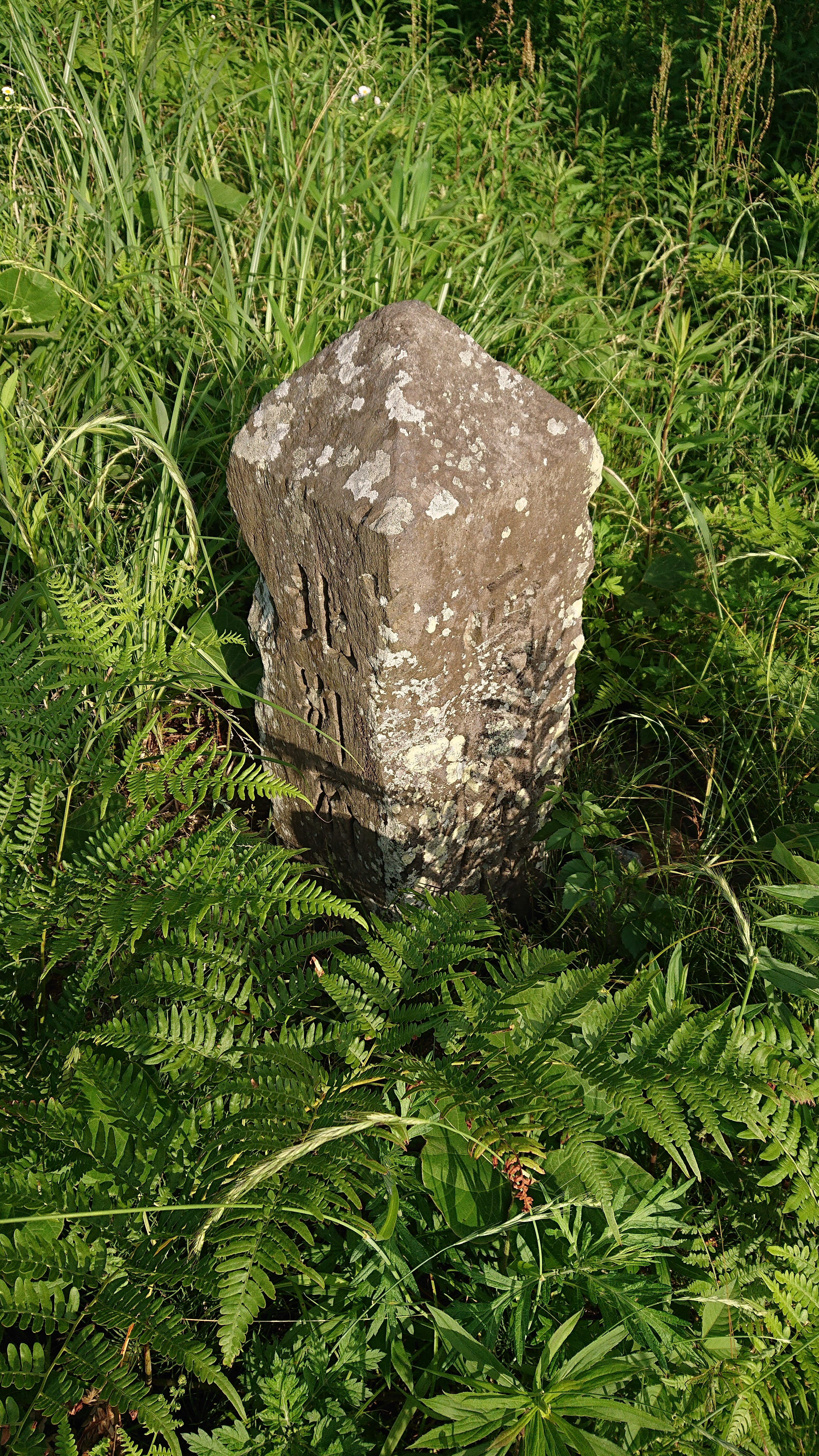 大分県銭瓶峠の道標